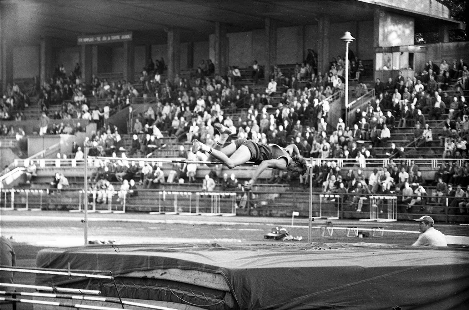 NSV Liit - USA - Saksa FV kümnevõistluses Tallinnas Kadrioru staadionil 1974 (05)